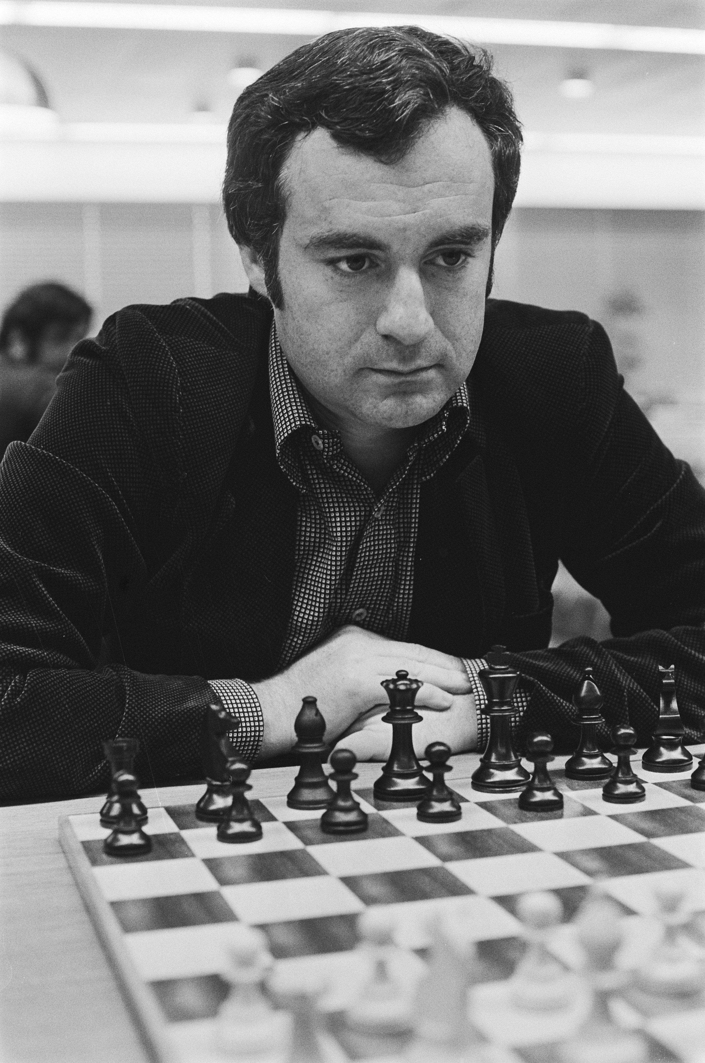 Collectie / Archief : Fotocollectie Anefo Reportage / Serie : [ onbekend ] Beschrijving : Interpolis schaaktoernooi 1e ronde; Sosonko Datum : 1 september 1978 Trefwoorden : schaken Fotograaf : Suyk, Koen / Anefo Auteursrechthebbende : Nationaal Archief Materiaalsoort : Negatief (zwart/wit) Nummer archiefinventaris : bekijk toegang 2.24.01.05 Bestanddeelnummer : 929-8815